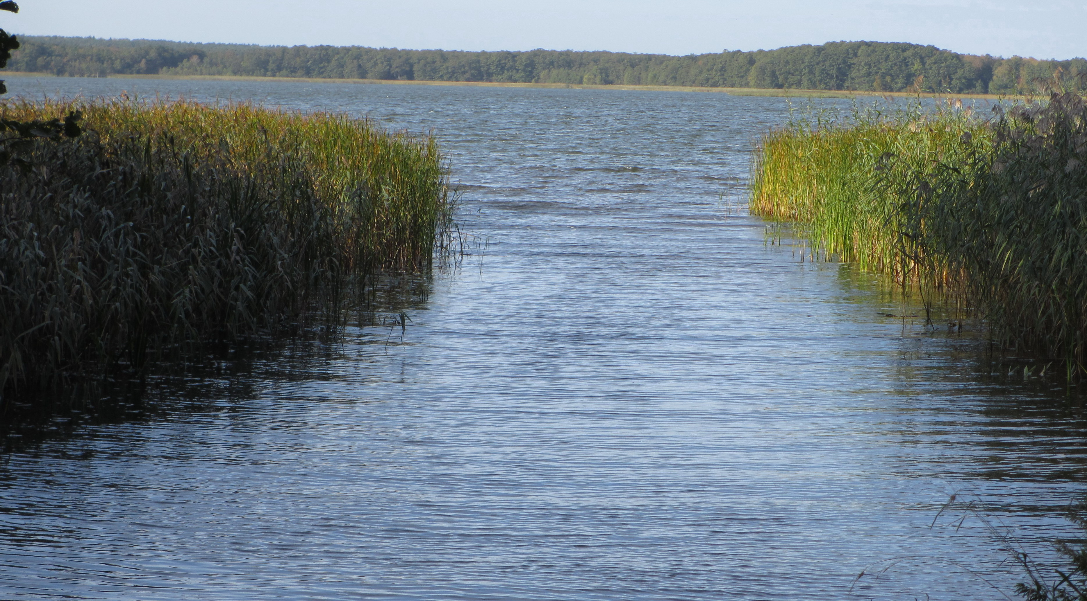 Wasserentnahmestelle am Ostufer des Woterfitzsee bei Zartwitz.